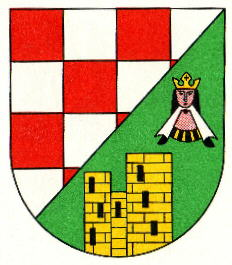 Wappen von Frauenberg (Nahe)